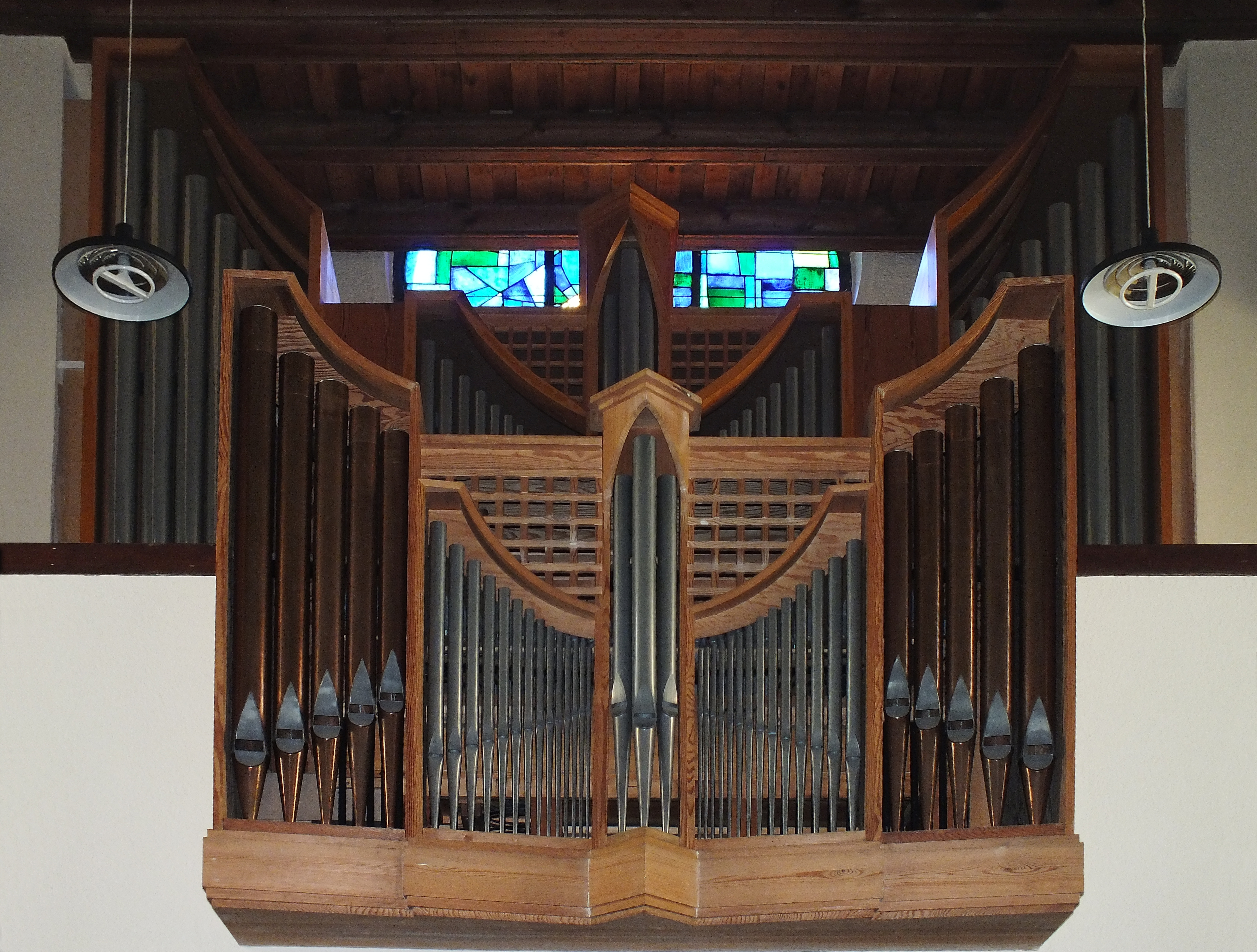 Berlin-Friedrichshagen: katholische Kapelle St. Franziskus, Ansicht von Nordwest